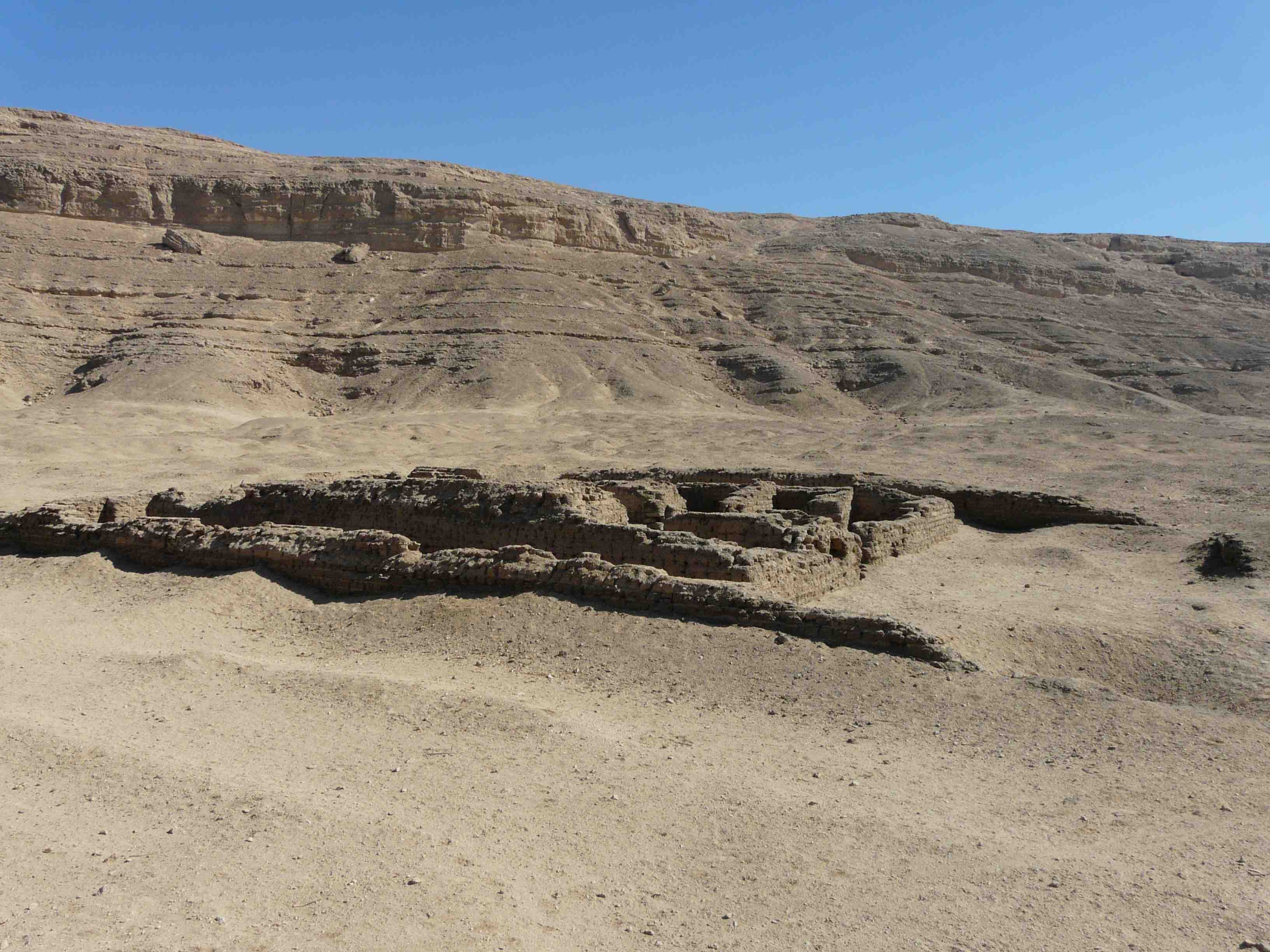 Amarna - Quartier résidentiel nord